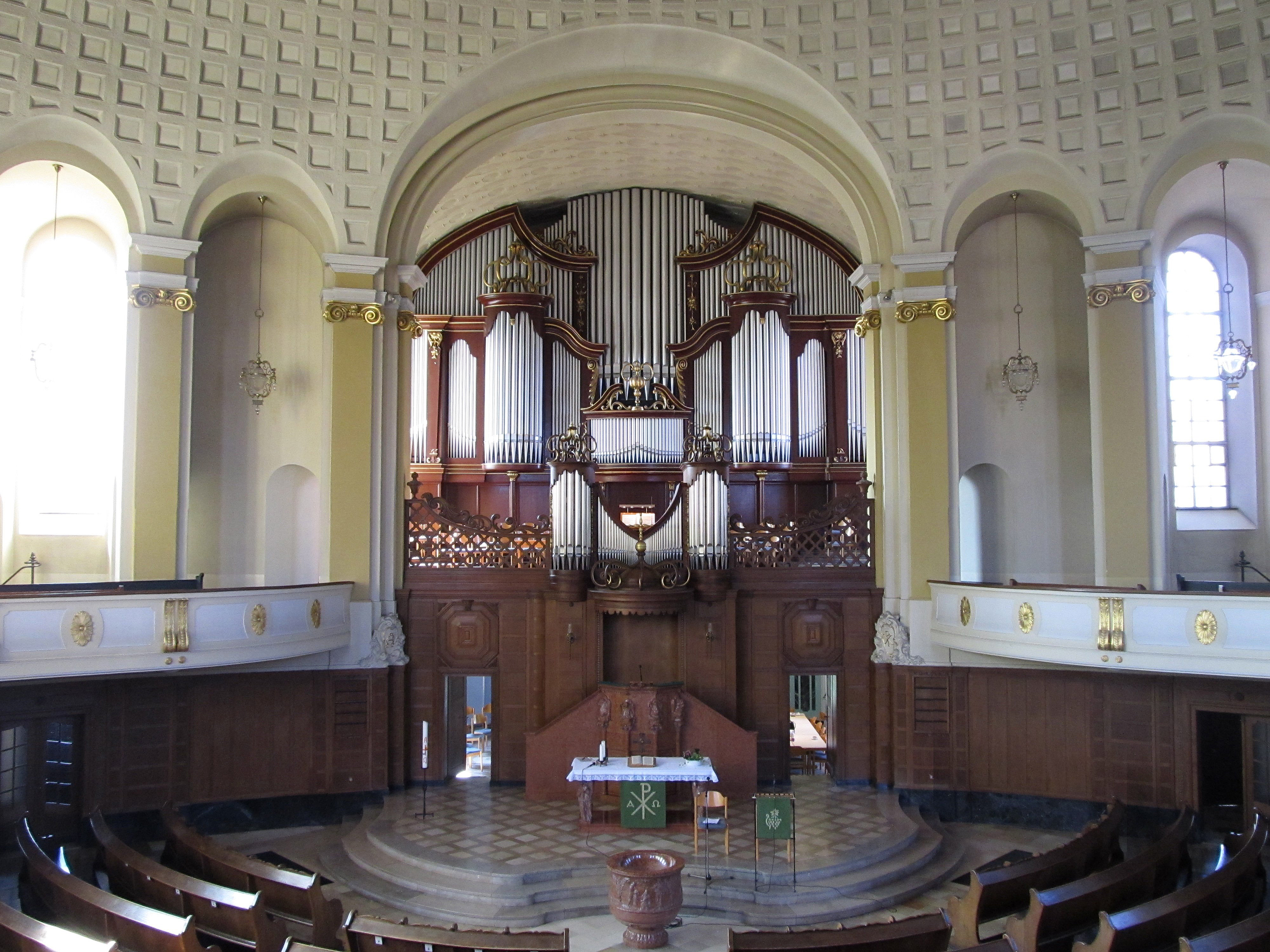 Blick ins Innere der evangelischen Versöhnungskirche in Völklingen, Saarland